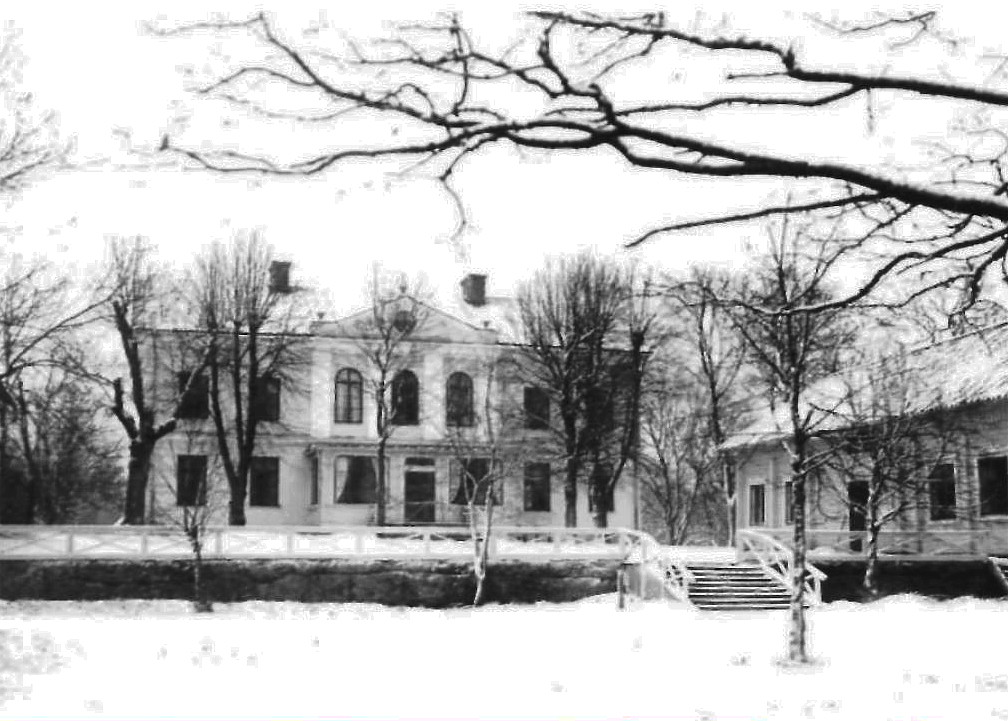 Skarpnäcks gård på 1930-talet